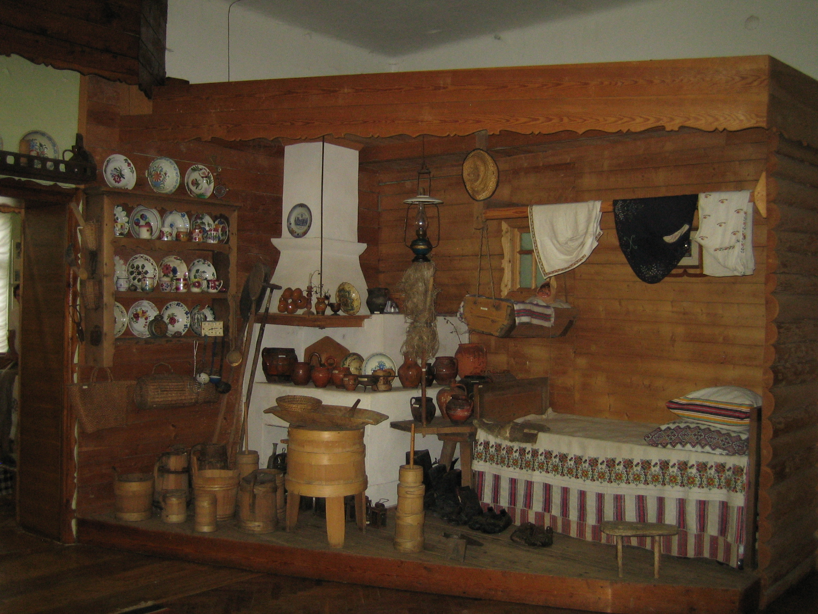 інтер'єр бойківської хати. Історико-краєзнавчий музей культури та побуту Бойківщини (Цінева)